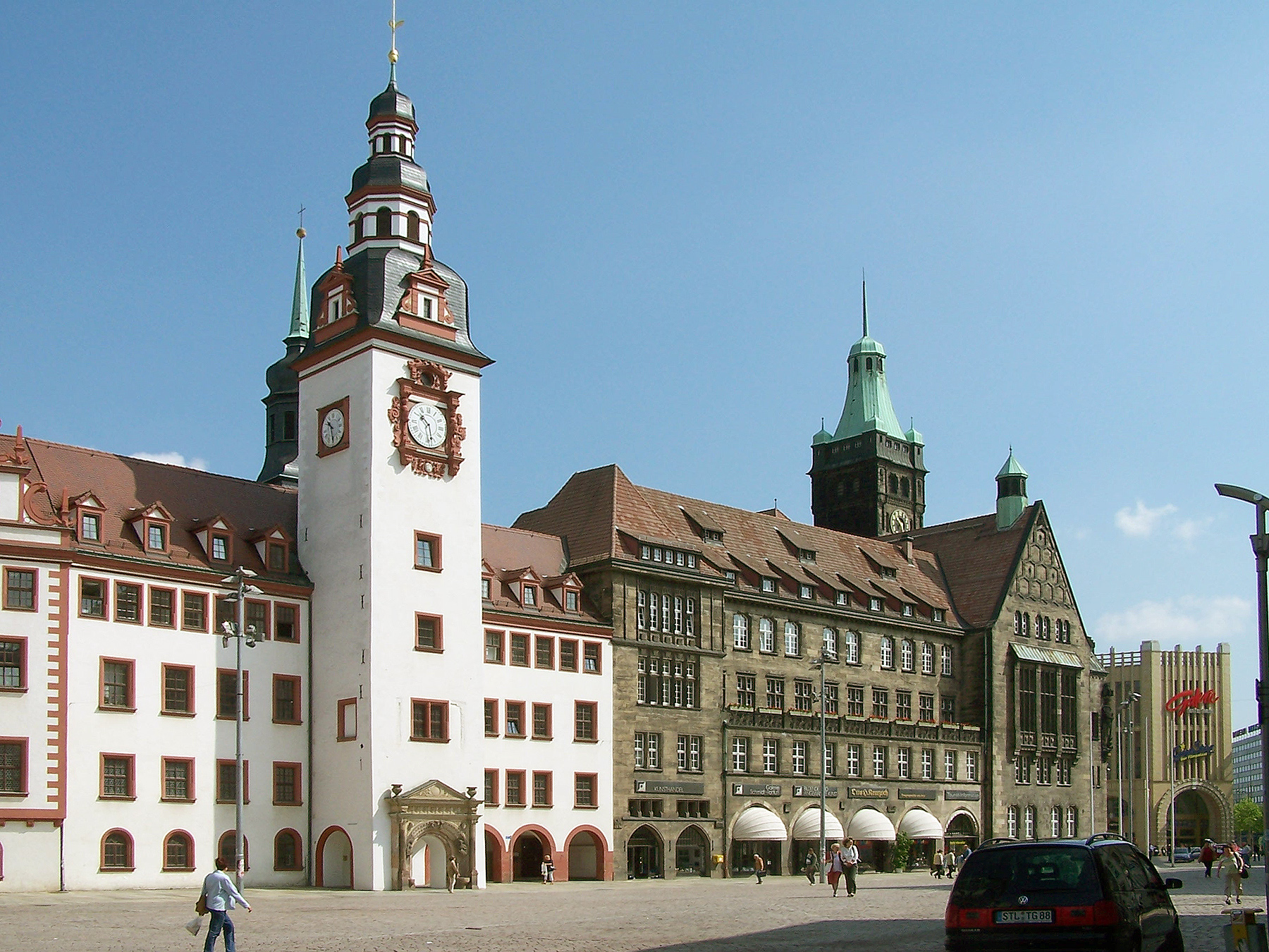 Beschreibung: das Alte und das Neue Rathaus in Chemnitz Quelle: selbst fotografiert am 13. Juni 2005 Fotograf: Reinhard Höll Lizenzstatus: GNU FDL Kategorie:Bild:Rathaus Kategorie:Chemnitz